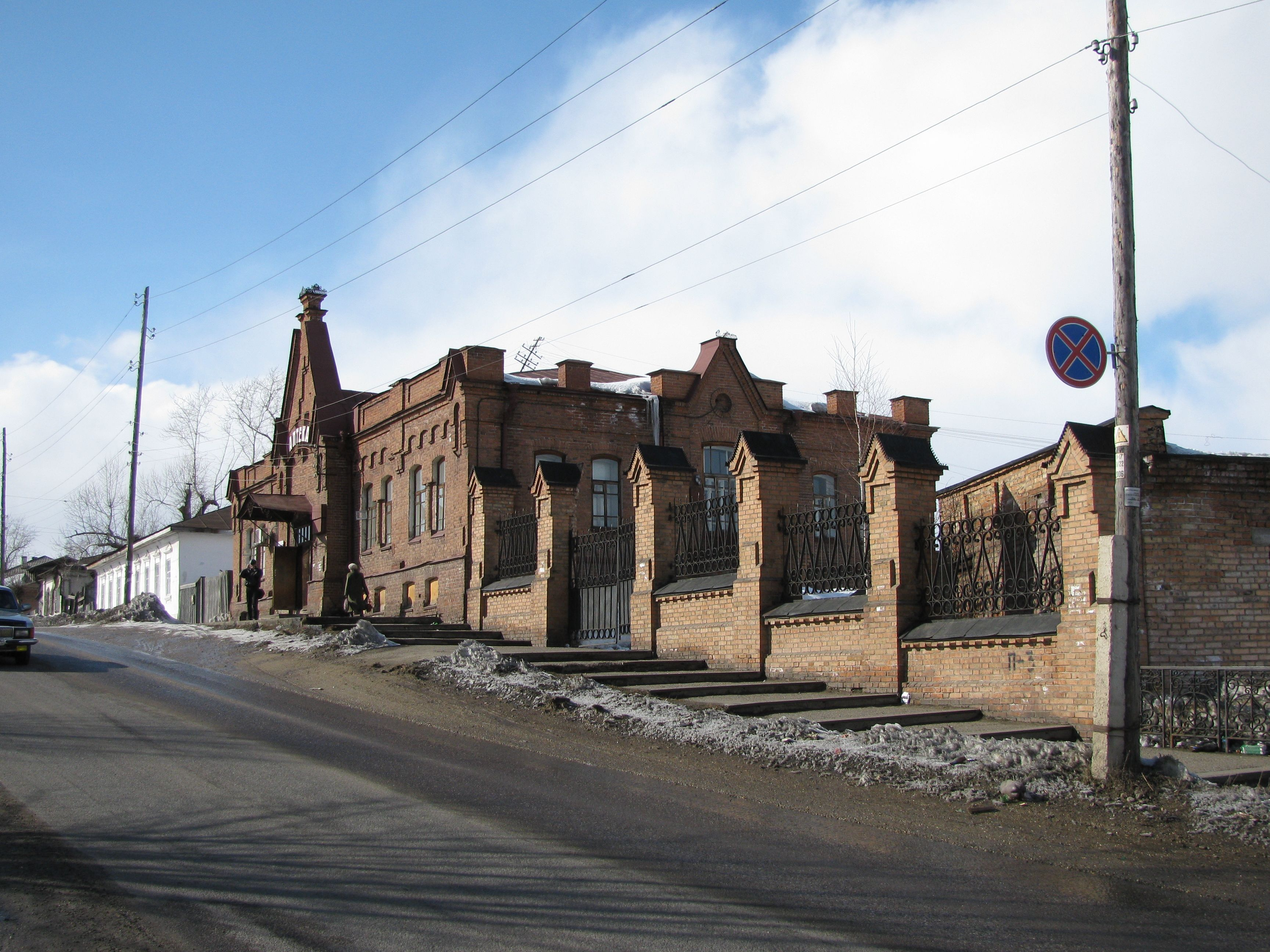 Первый город на нашем маршруте. Енисейск. И его аптека.